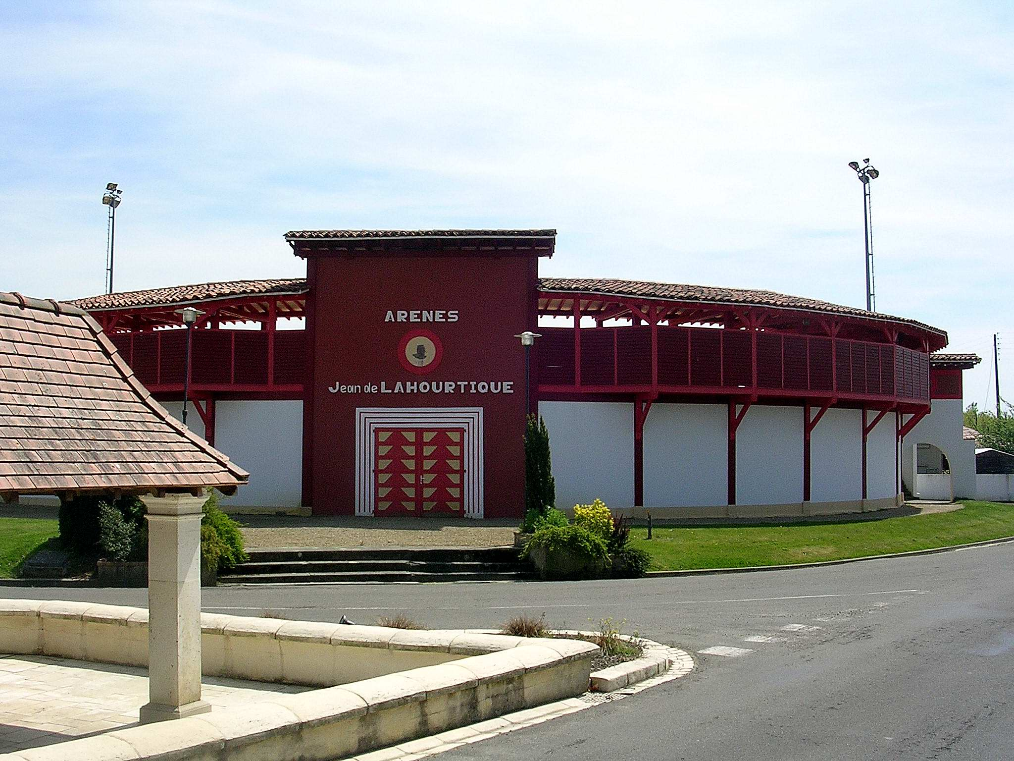 Arènes Jean de Lahourtique à Bascons, dans le département français des Landes